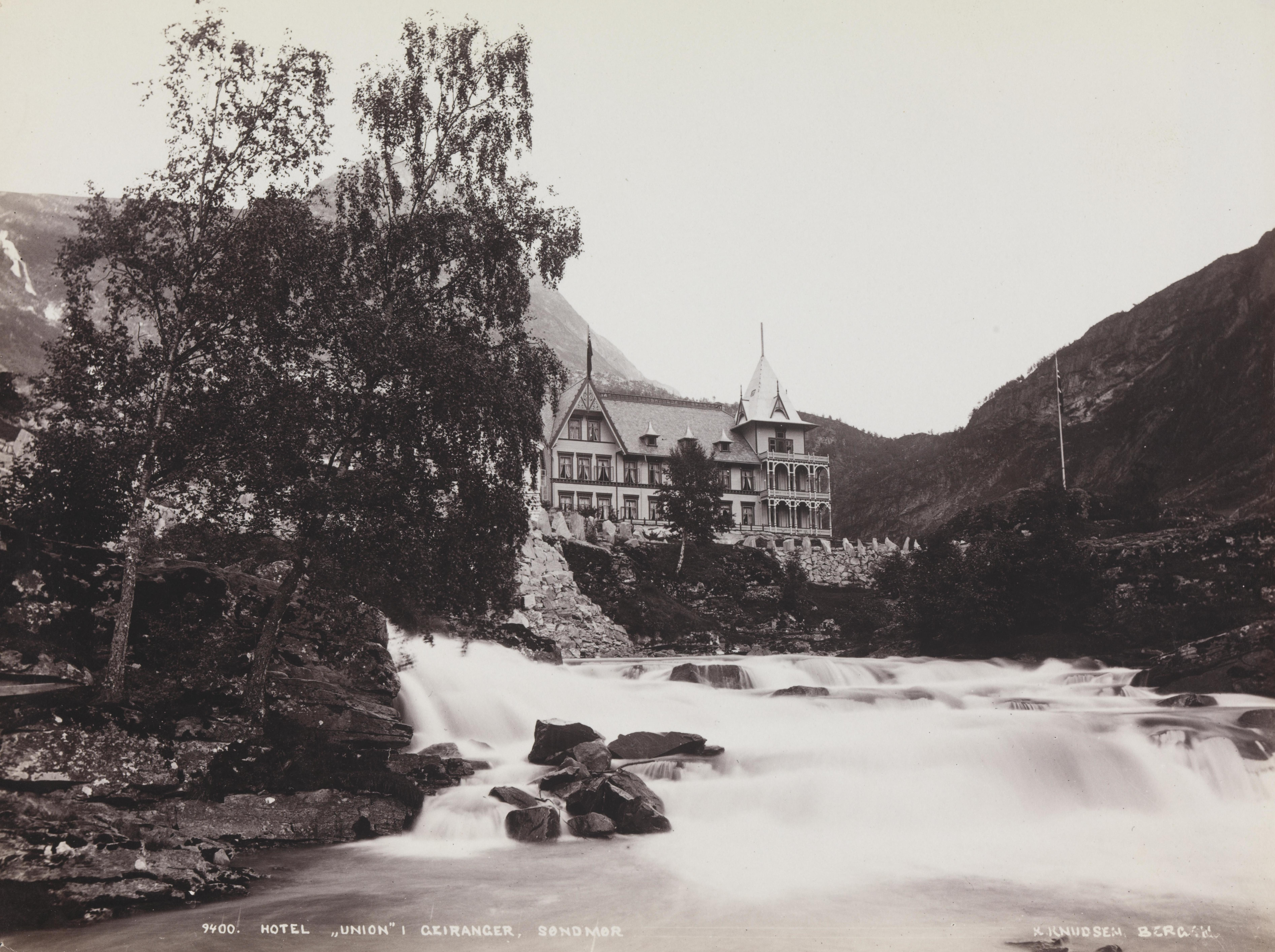 Bildet er hentet fra Nasjonalbibliotekets bildesamling Geiranger, Stranda, Møre og Romsdal